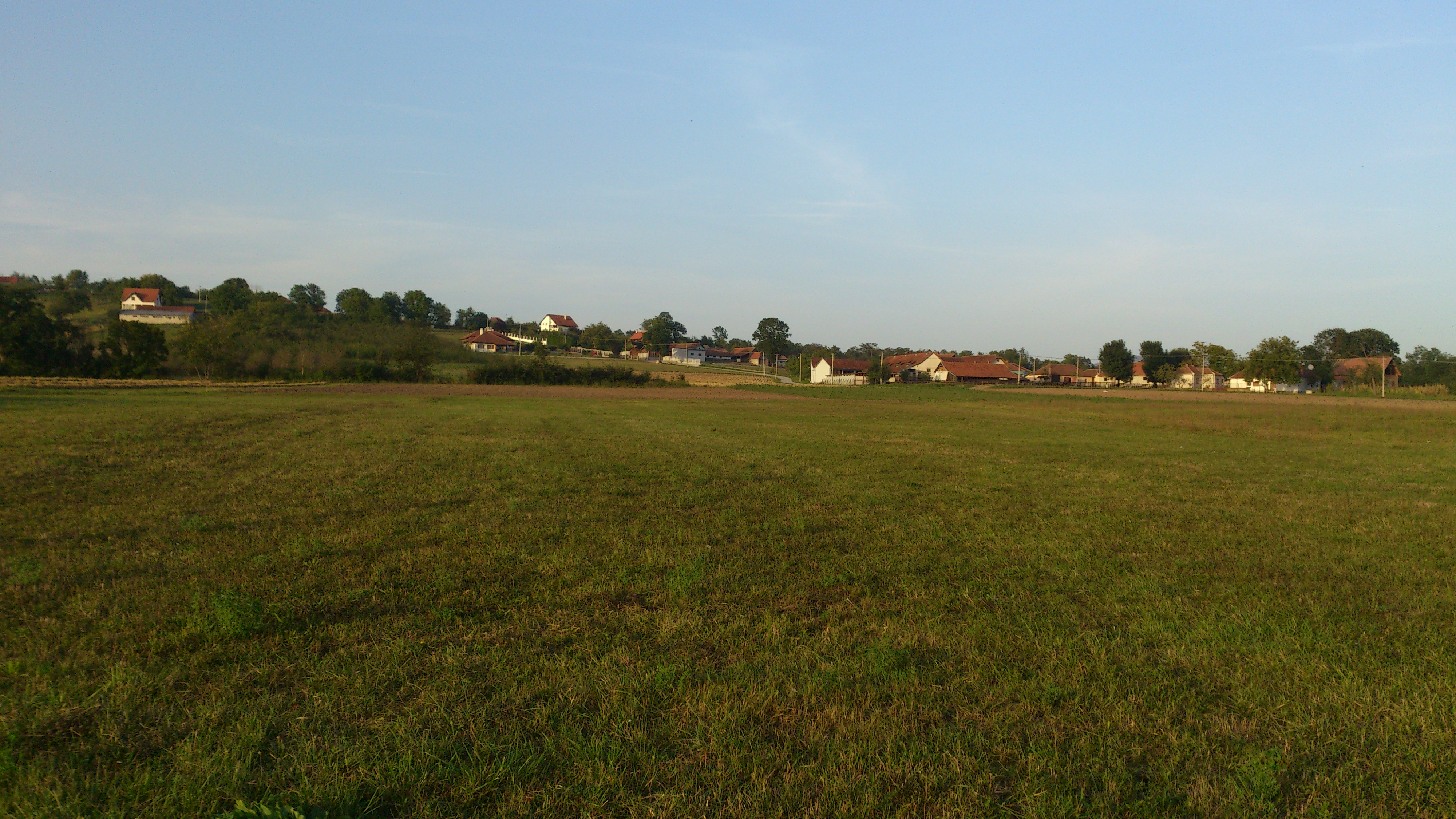 Поглед на њиве и куће у селу Ракова.